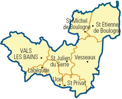 Carte détaillée des communes du canton (Ardèche)